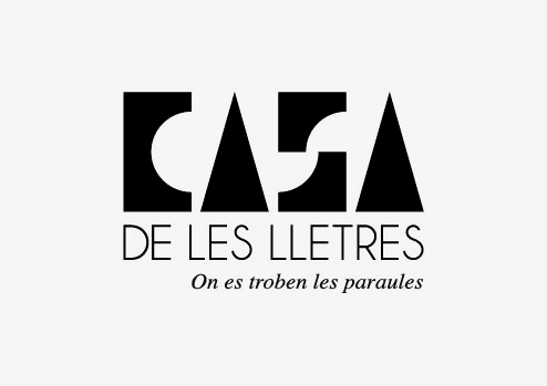 Logotip Casa de les Lletres